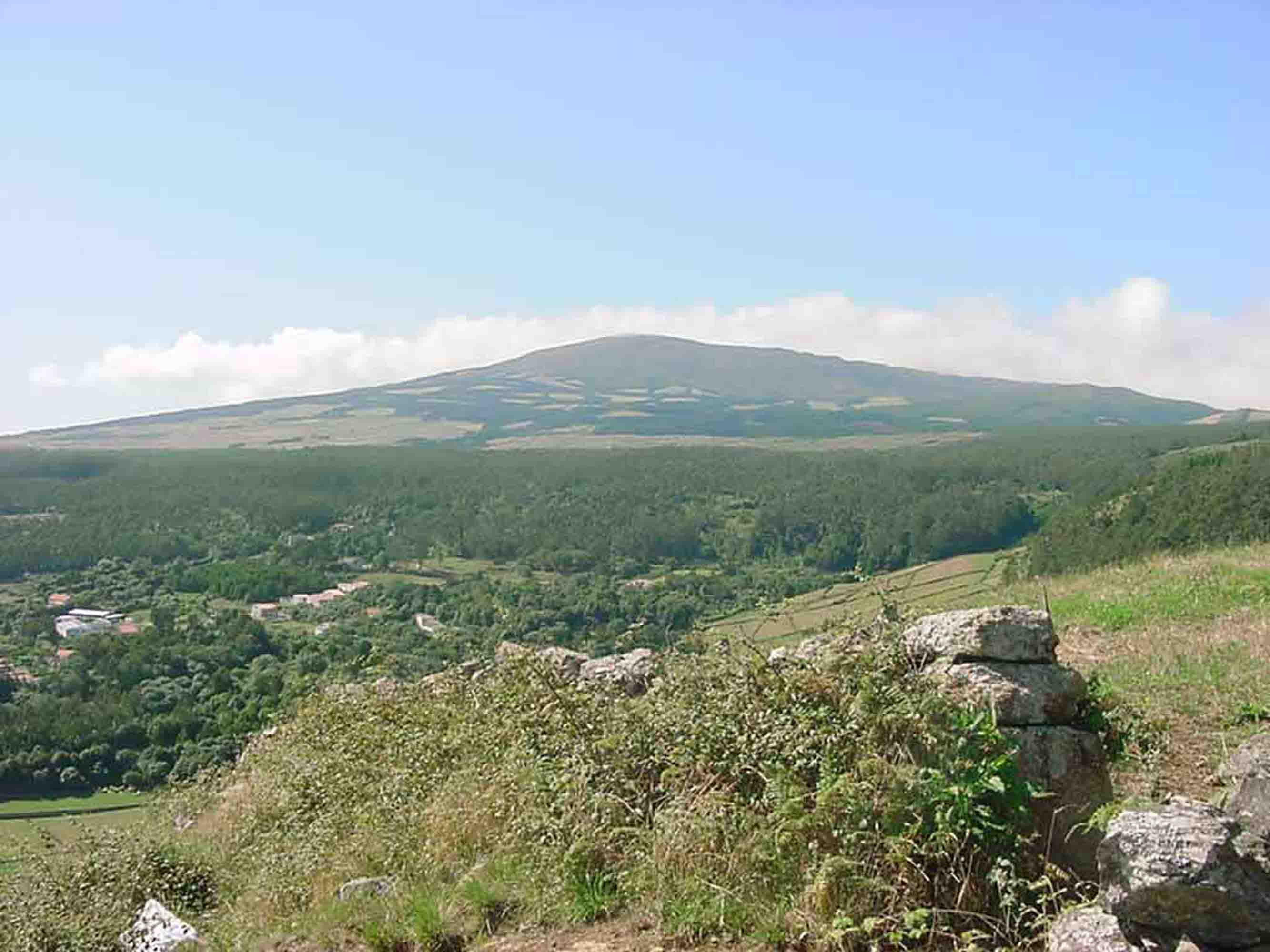 Serra Santa Barbara2, Açores, Portugal.